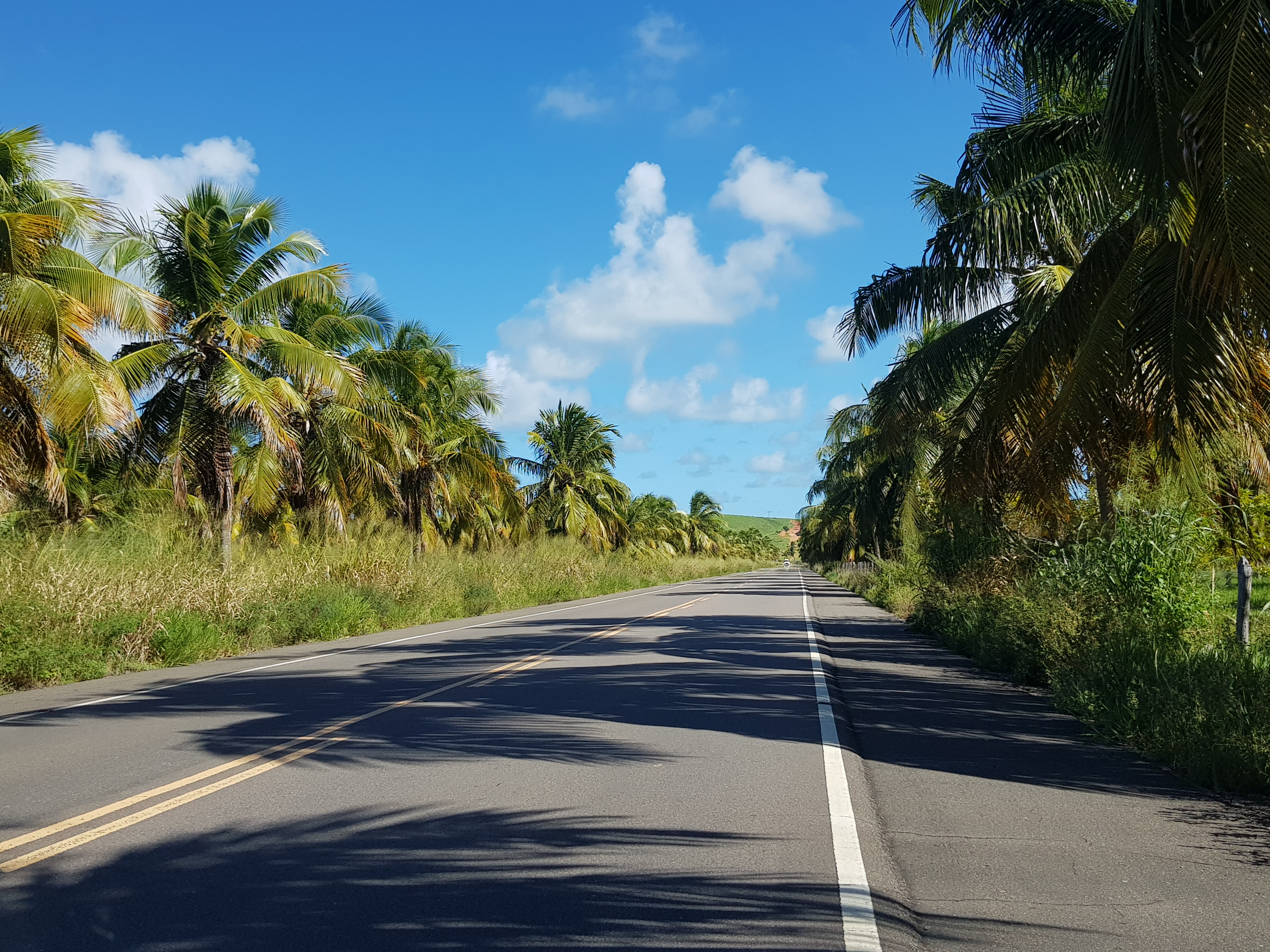 Rodovoa AL-101, próximo à praia de Gunga, município de Roteiro